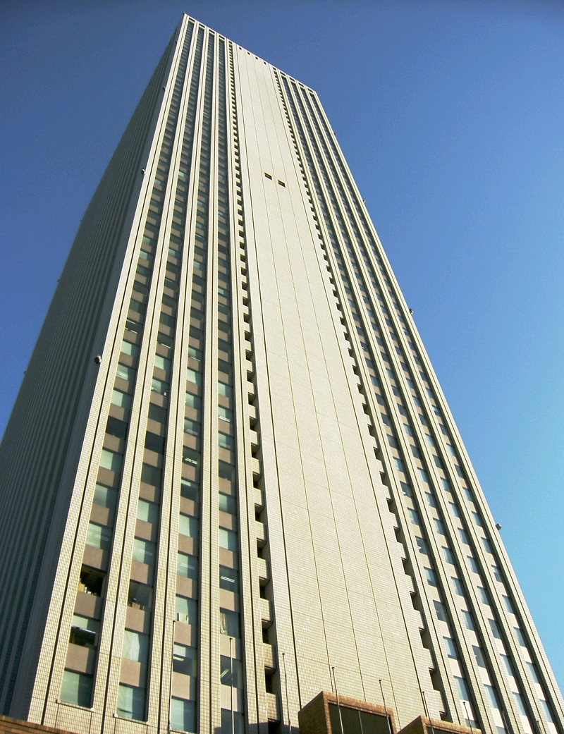 Sunshine_60_Ikebukuro_Tokyo Japan